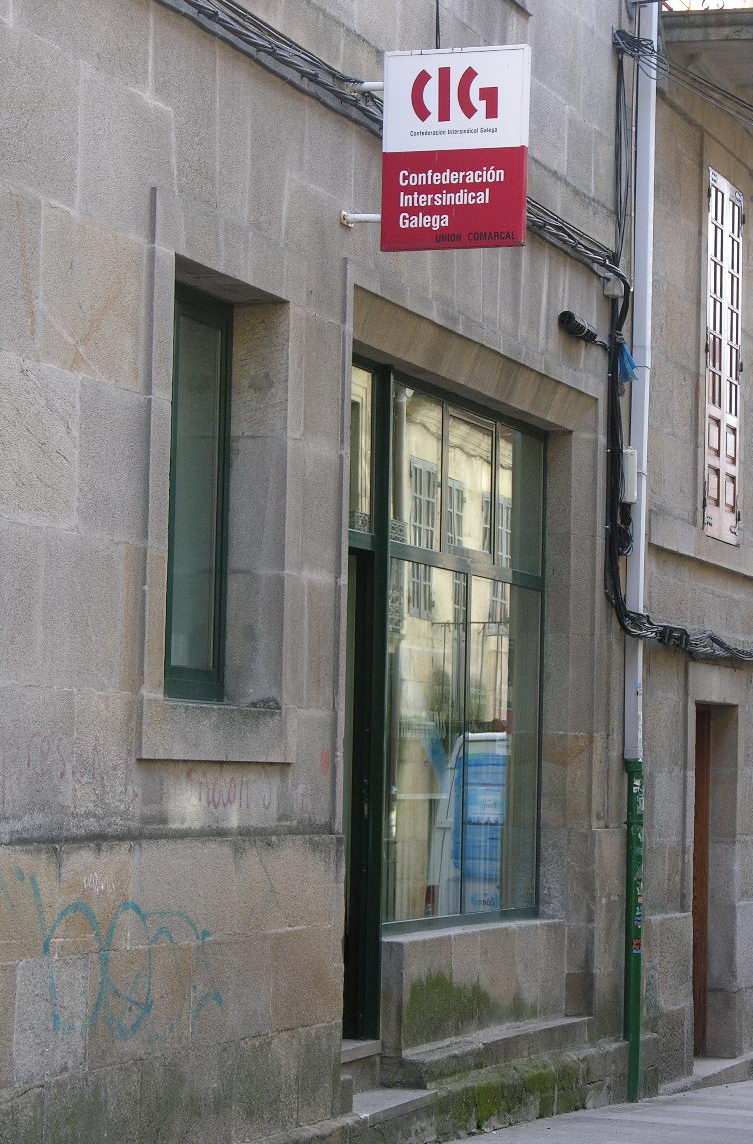 Edificio da CIG. Pontevedra, Galicia Publish by= Luis Miguel Bugallo Sánchez.